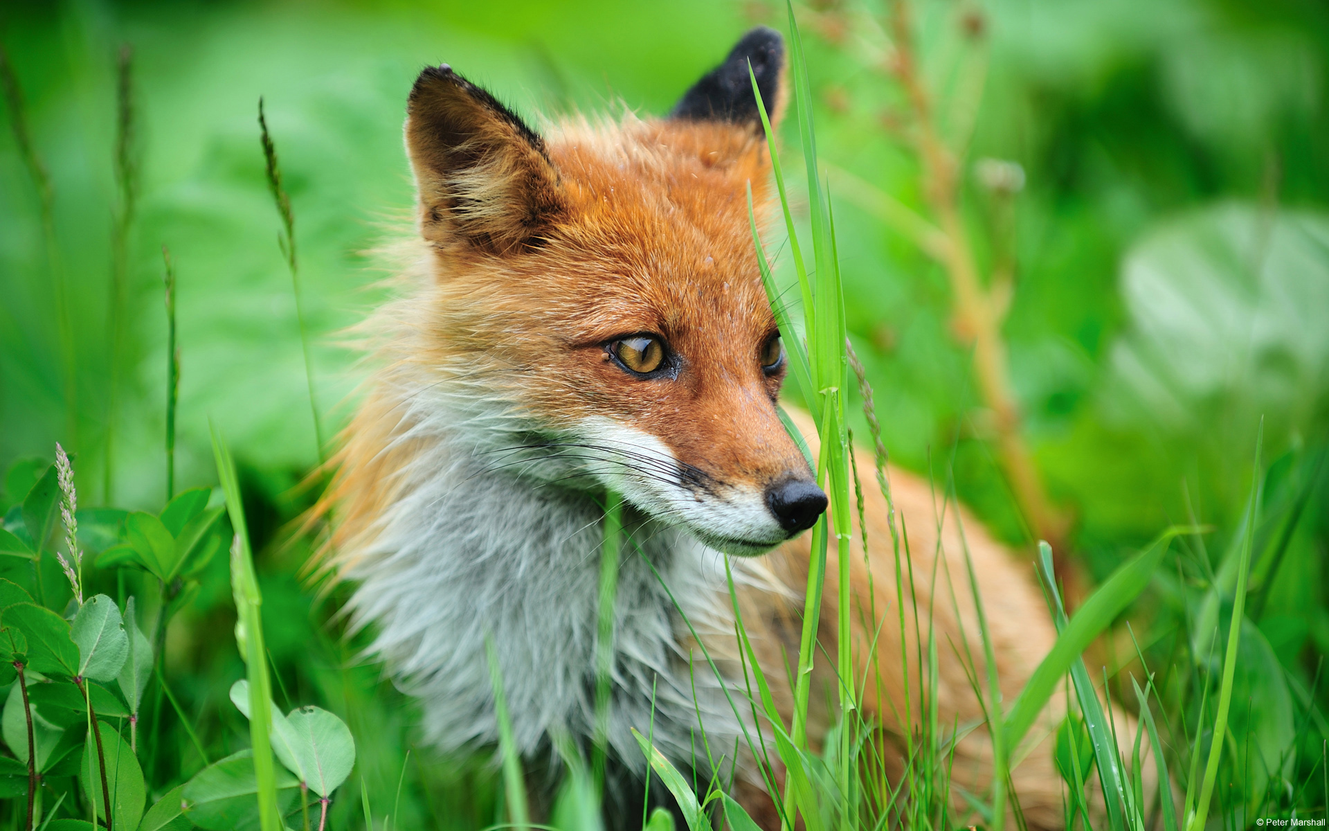 Se puede ver un Zorro